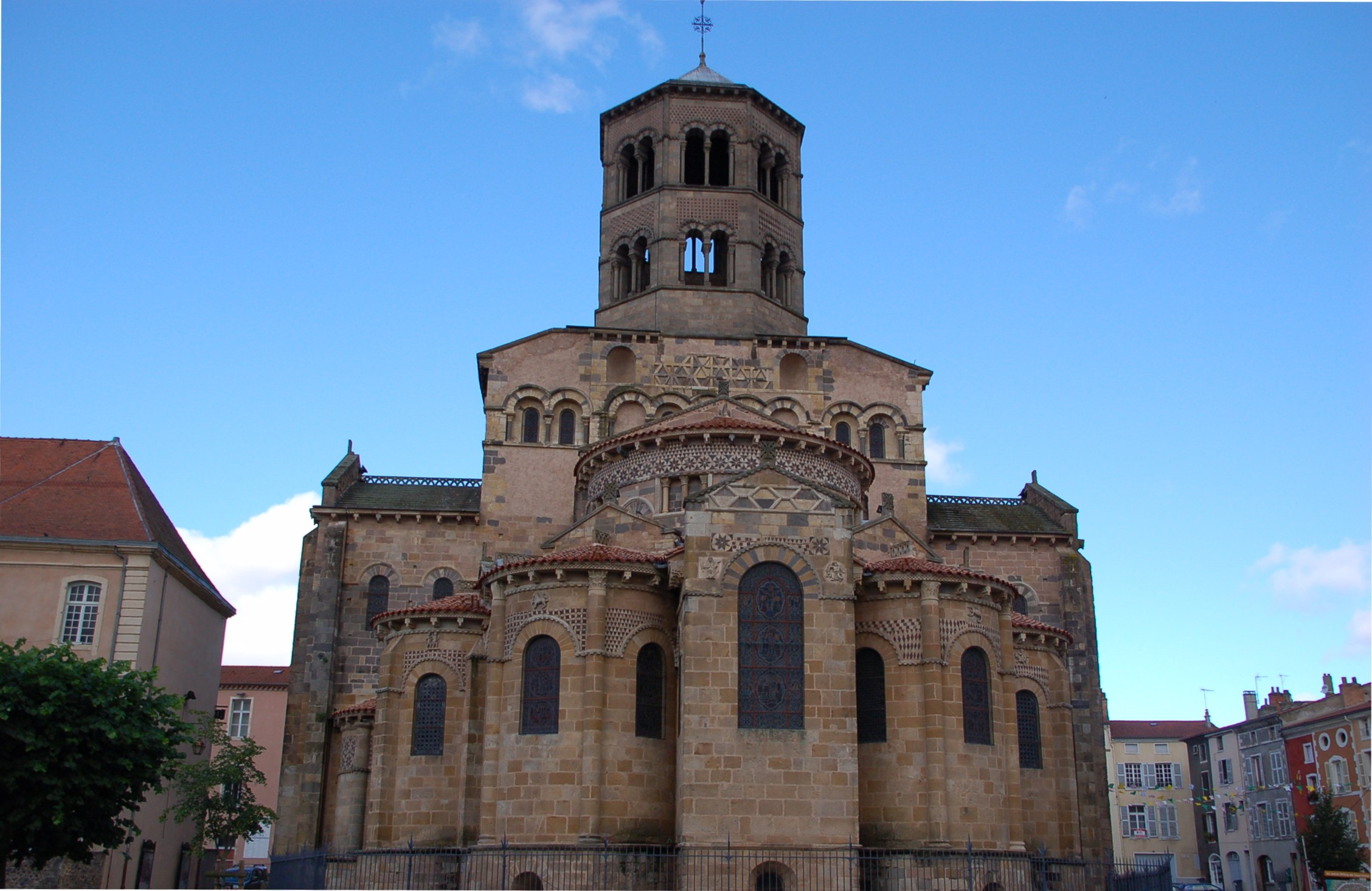 Chevet de l'église Saint-Austremoine d'Issoire